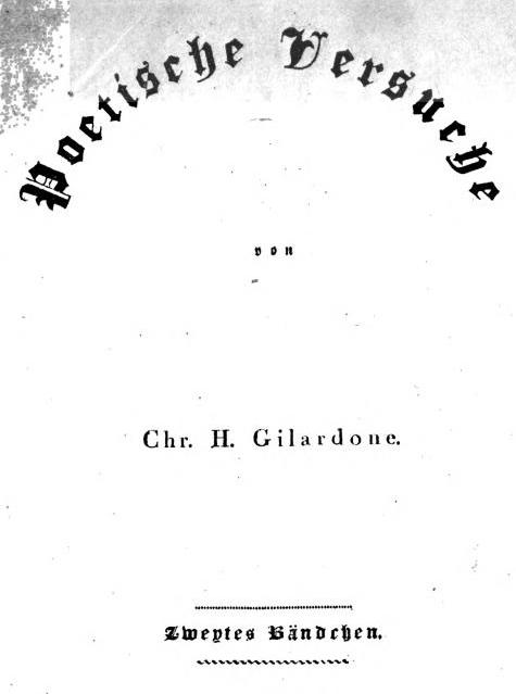 Christian Heinrich Gilardone, Titelblatt zu Poetsche Versuche 1830